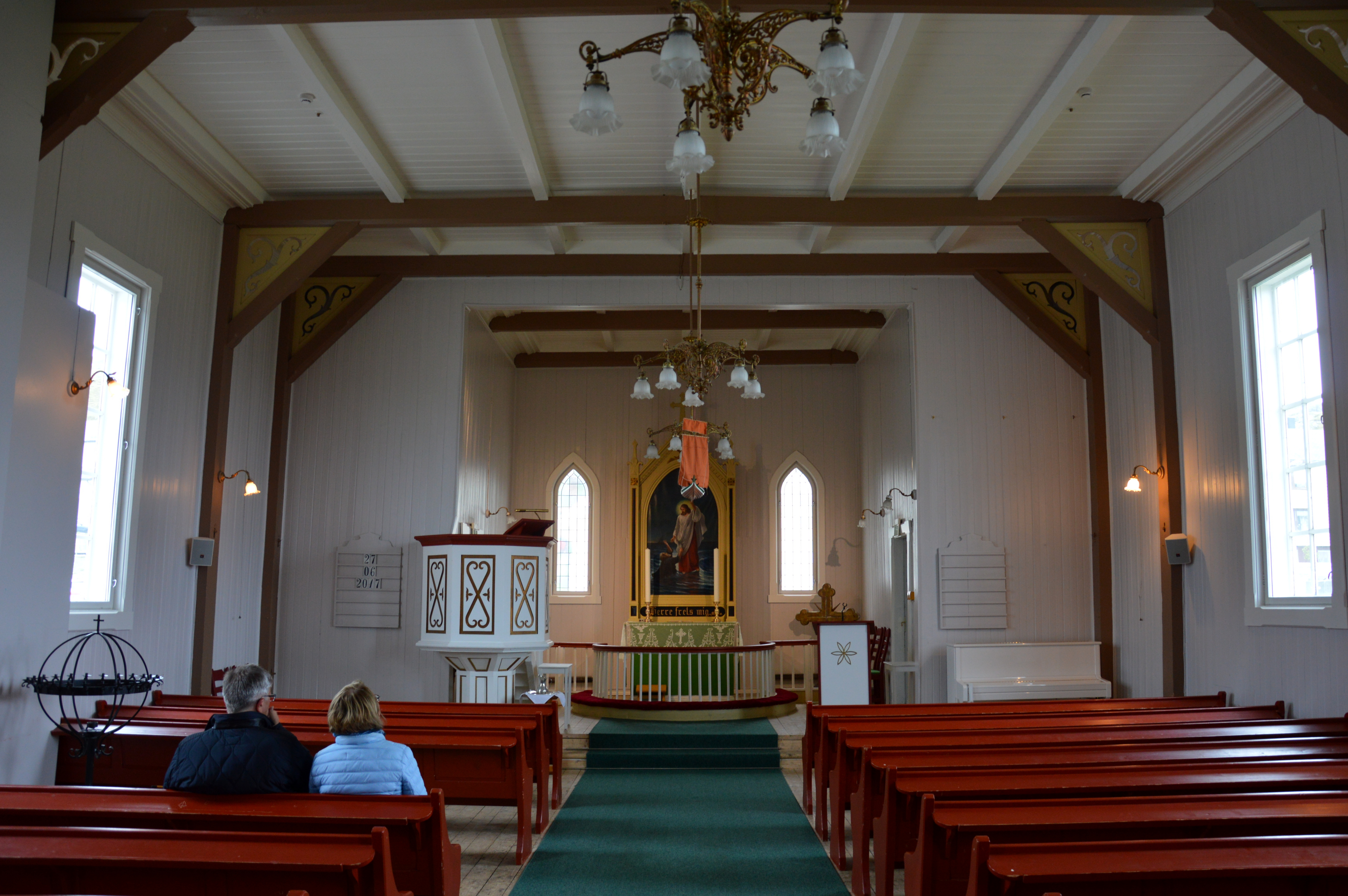 Kirche von Honningsvag